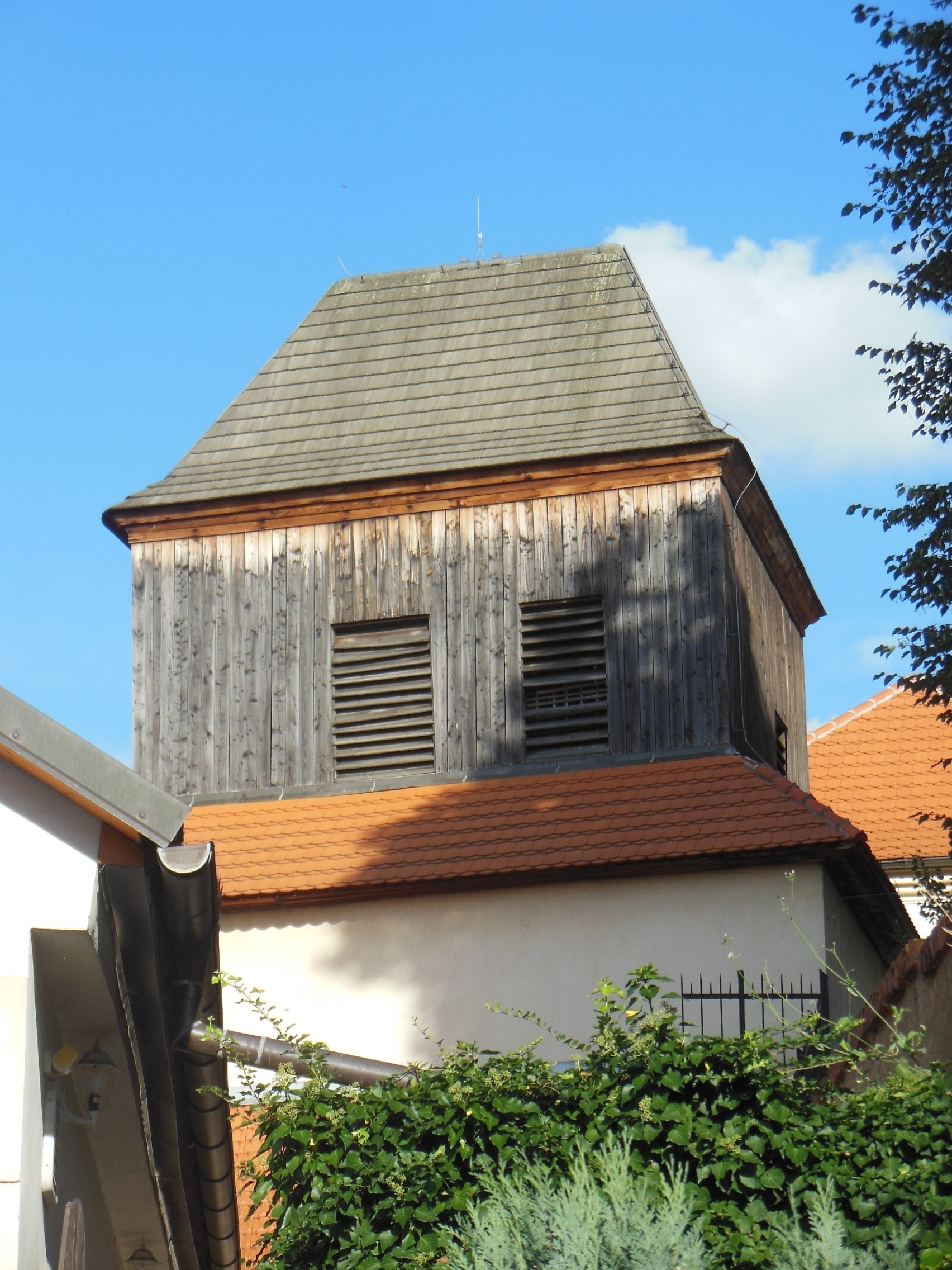 Pohled z ulice Pivovarská na zvonici u kostela svaté Kateřiny Alexandrijské ve Velvarech (okres Kladno).